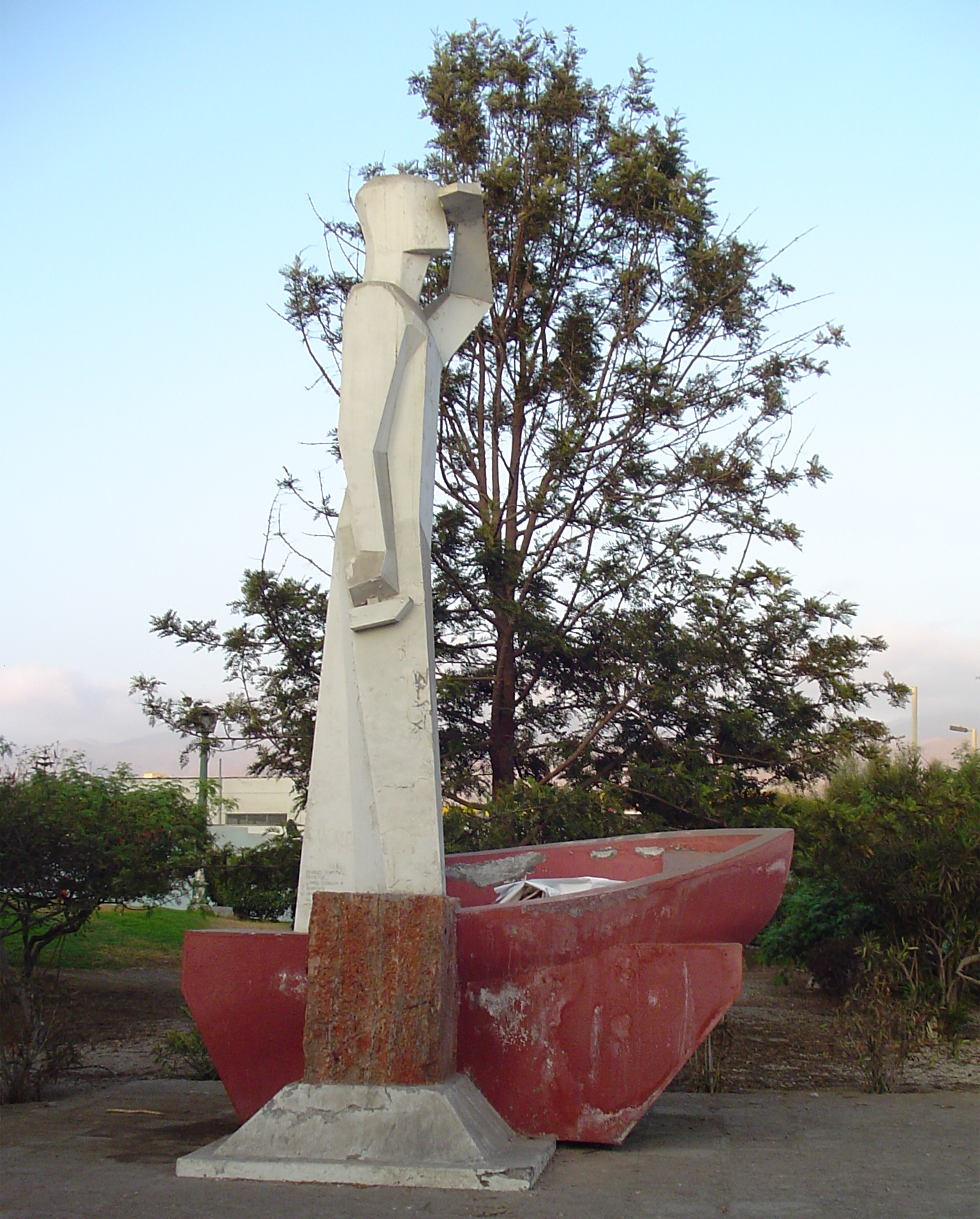 Monumento estatuario a Juan López. Obra del escultor Osvaldo Ventura López.